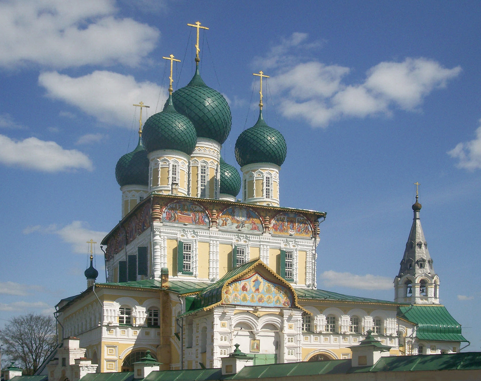 Воскресенский собор. Общий вид